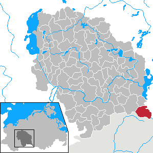 Wendisch Priborn in Mecklenburg-Vorpommern - District Parchim